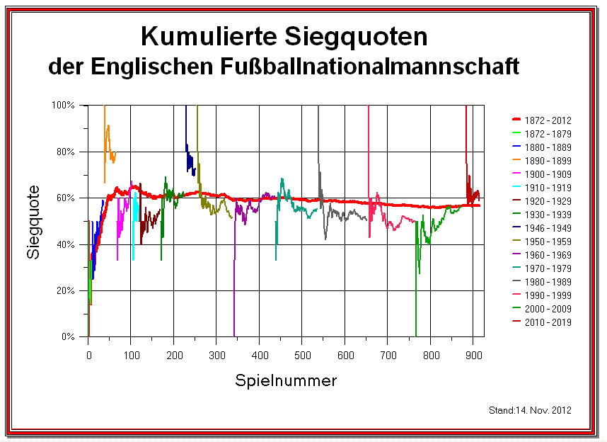 Kumulierte Siegquote der Englischen Nationalmannschaft